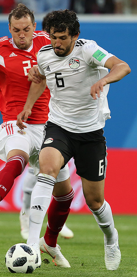 Историческая победа сборной России в матче с Египтом!